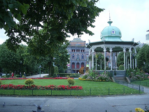 Stadtpark von Bergen (Norwegen) mit Pavillon, selbst fotografiert am 15.09.2004, GNU FDL